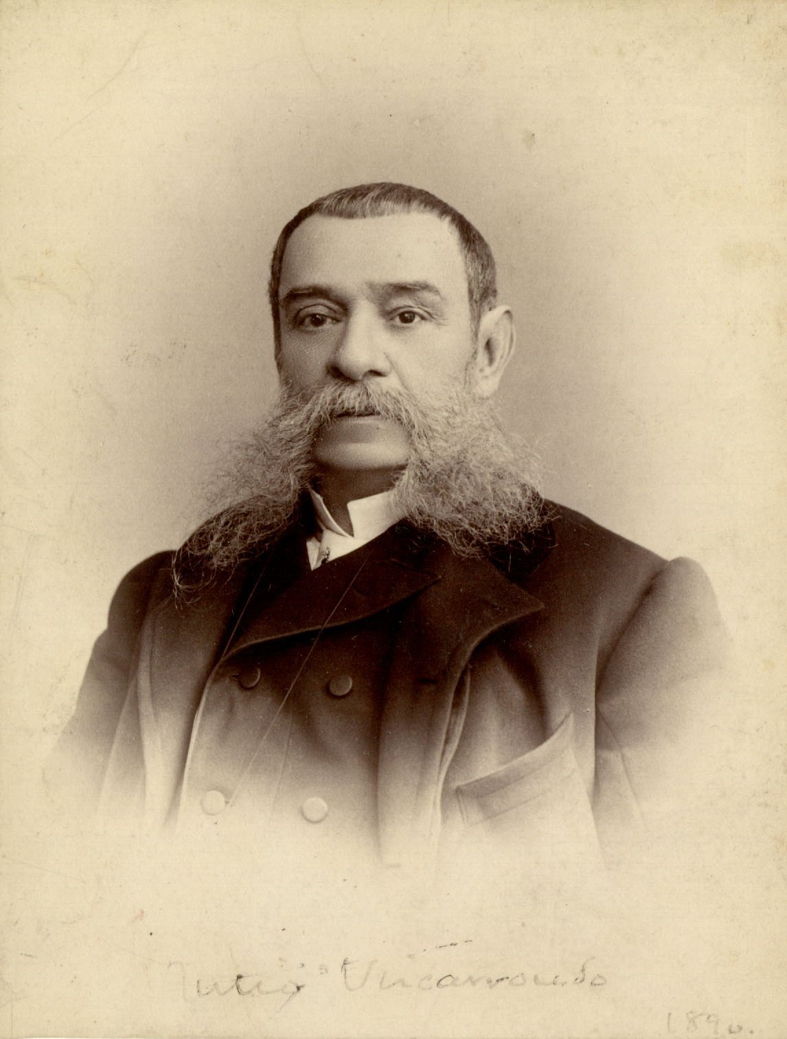 Puerto Rican abolitionist D. Julio Vizcarrondo y Coronado